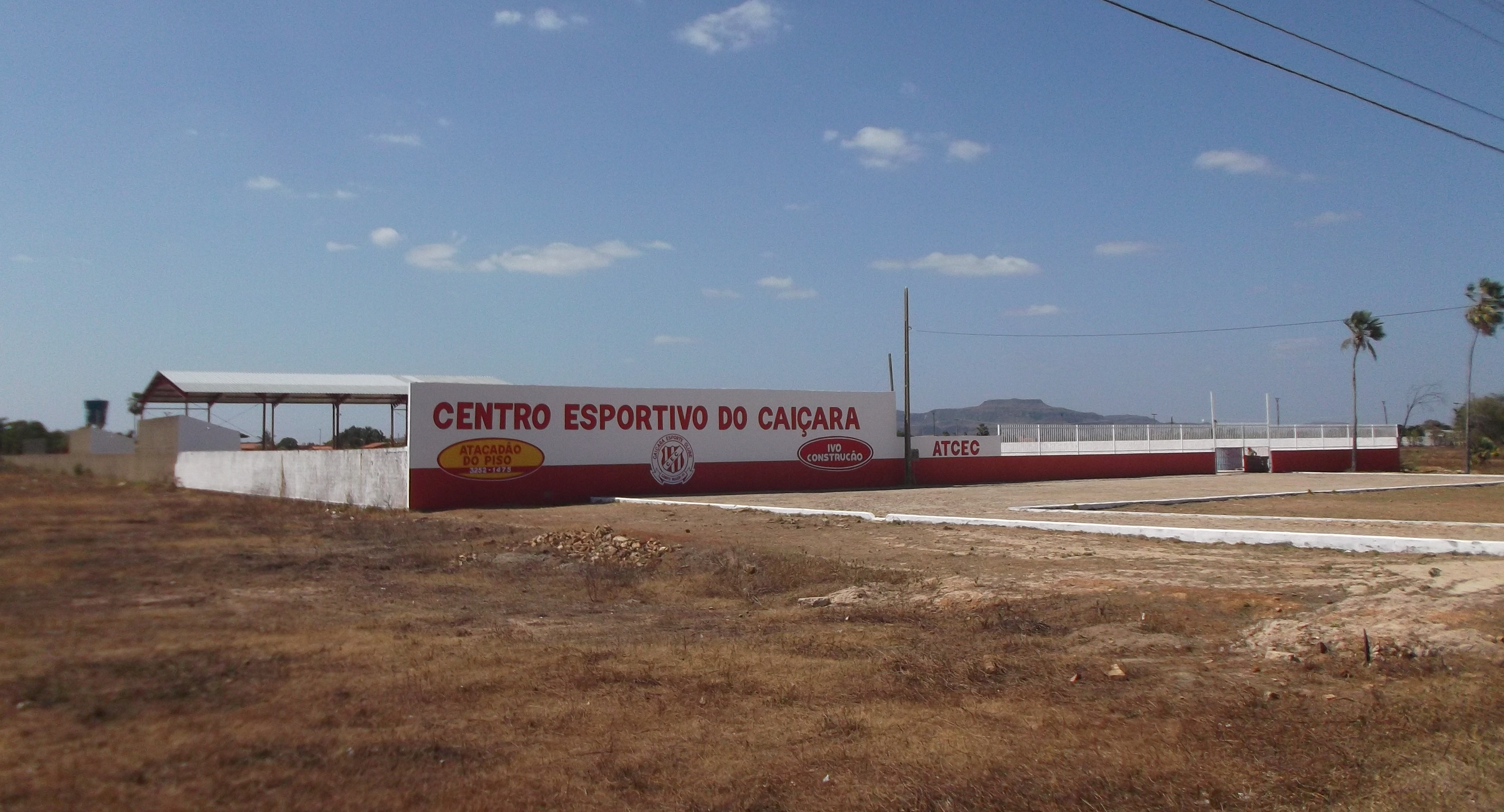 Centro Espotivo do Caiçara Esporte Clube, em Campo Maior,Piauí